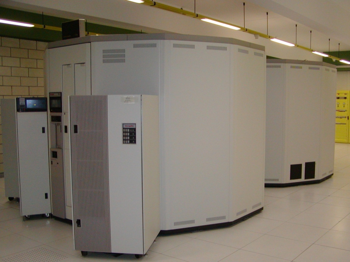 Silo Storagetek